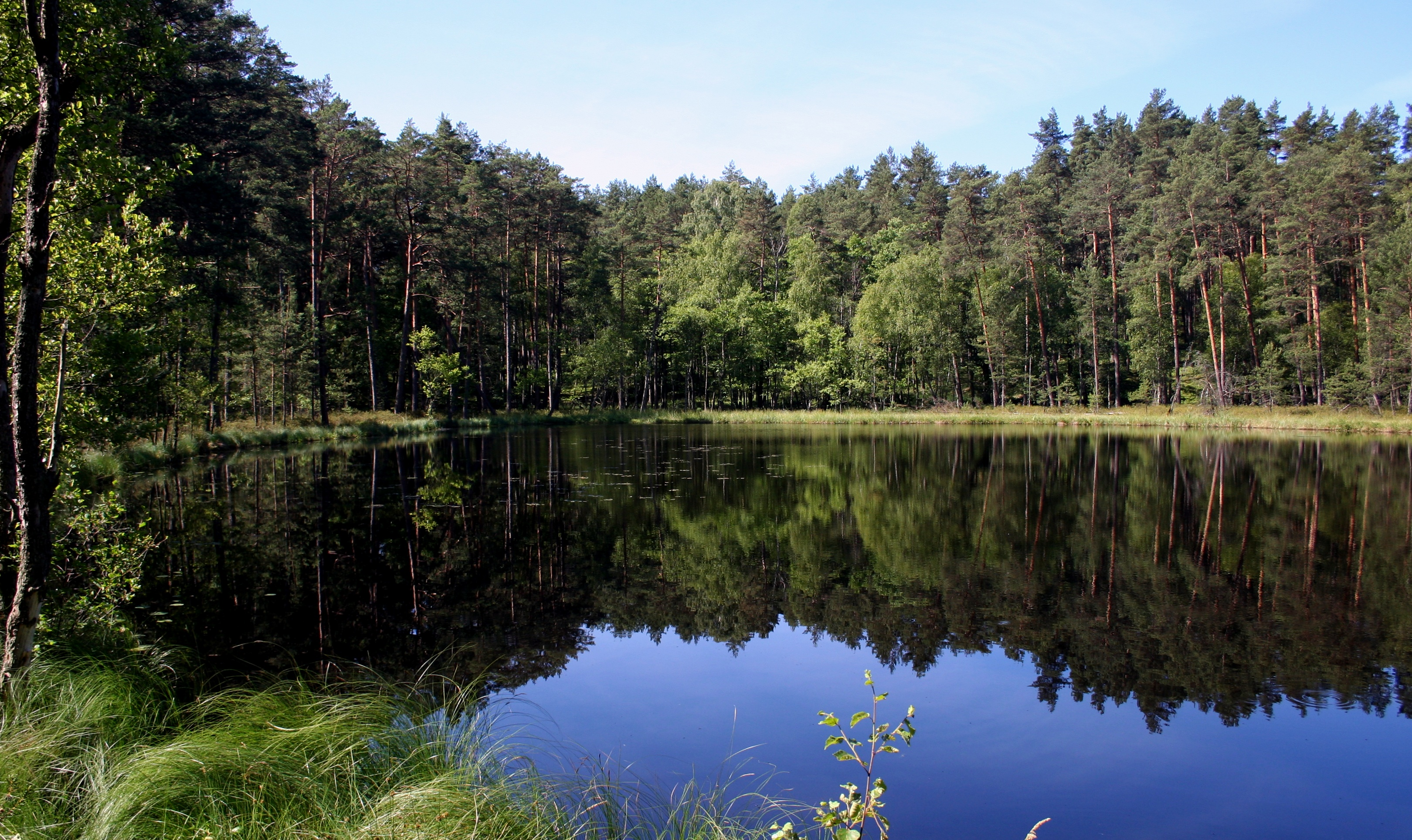 Kacze Oko - jezioro dystroficzne w Parku Narodowym Bory Tucholskie, objęte ochroną ścisłą (o powierzchni 0,3 ha, głębokości maksymalnej 5,4 m i głębokości średniej 4,6 m)